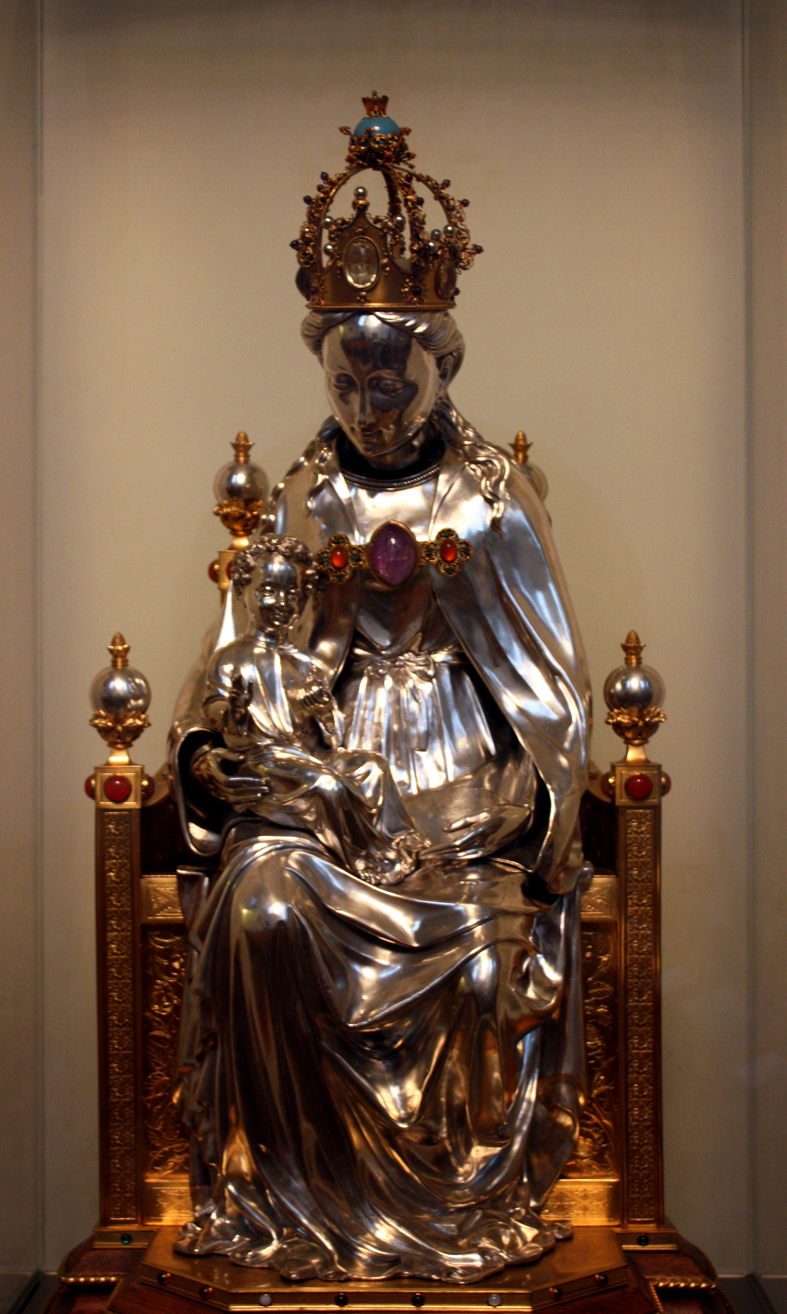 St. Maria in der Kupfergasse Köln, Madonna mit Kind in einer Vitrine an der Ostwand